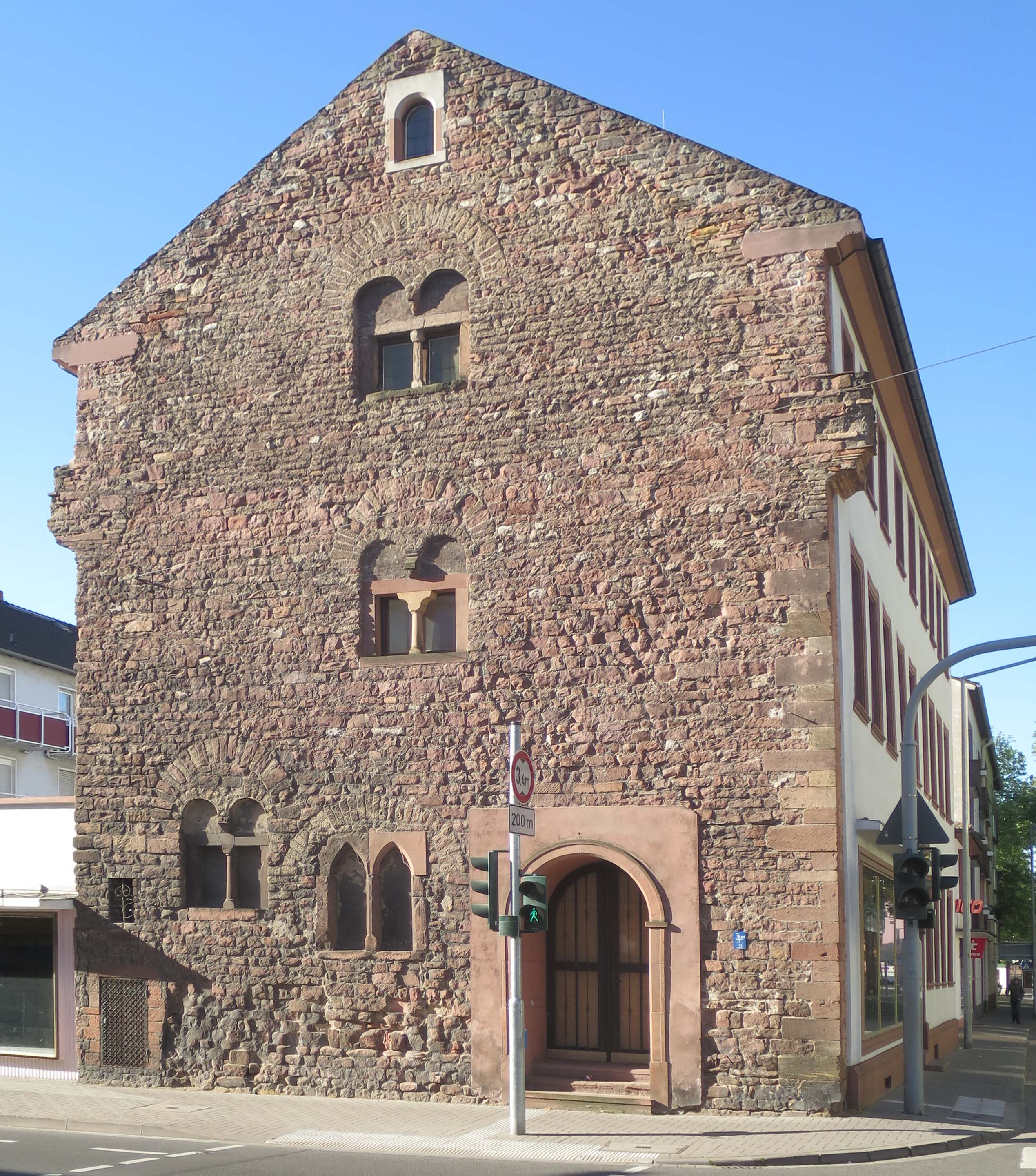 Römerstraße 44 (Ecke Petersstraße). Romanische Hausfassade.